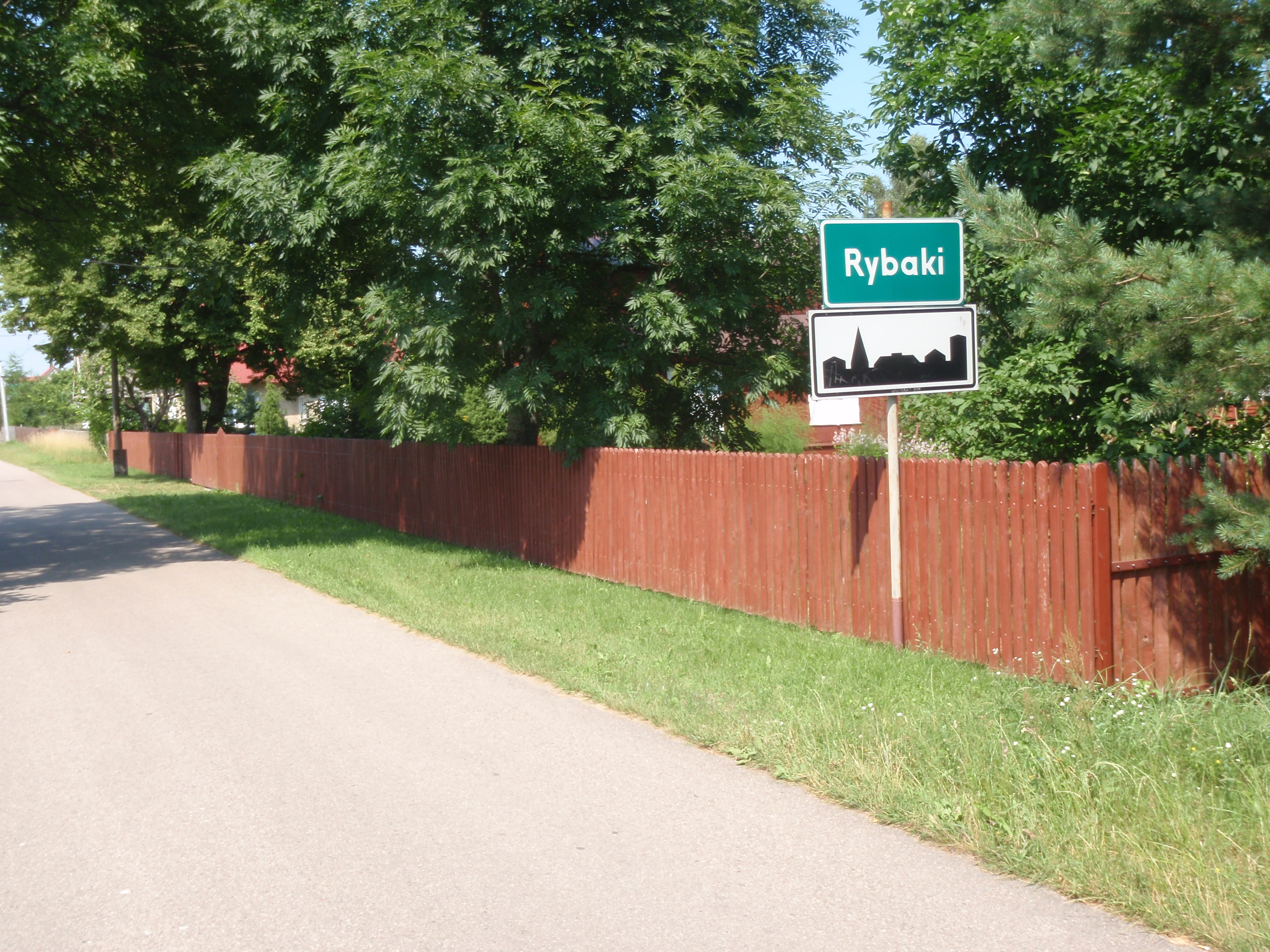 południowy (główny) wjazd do wsi Rybaki w gminie Narew